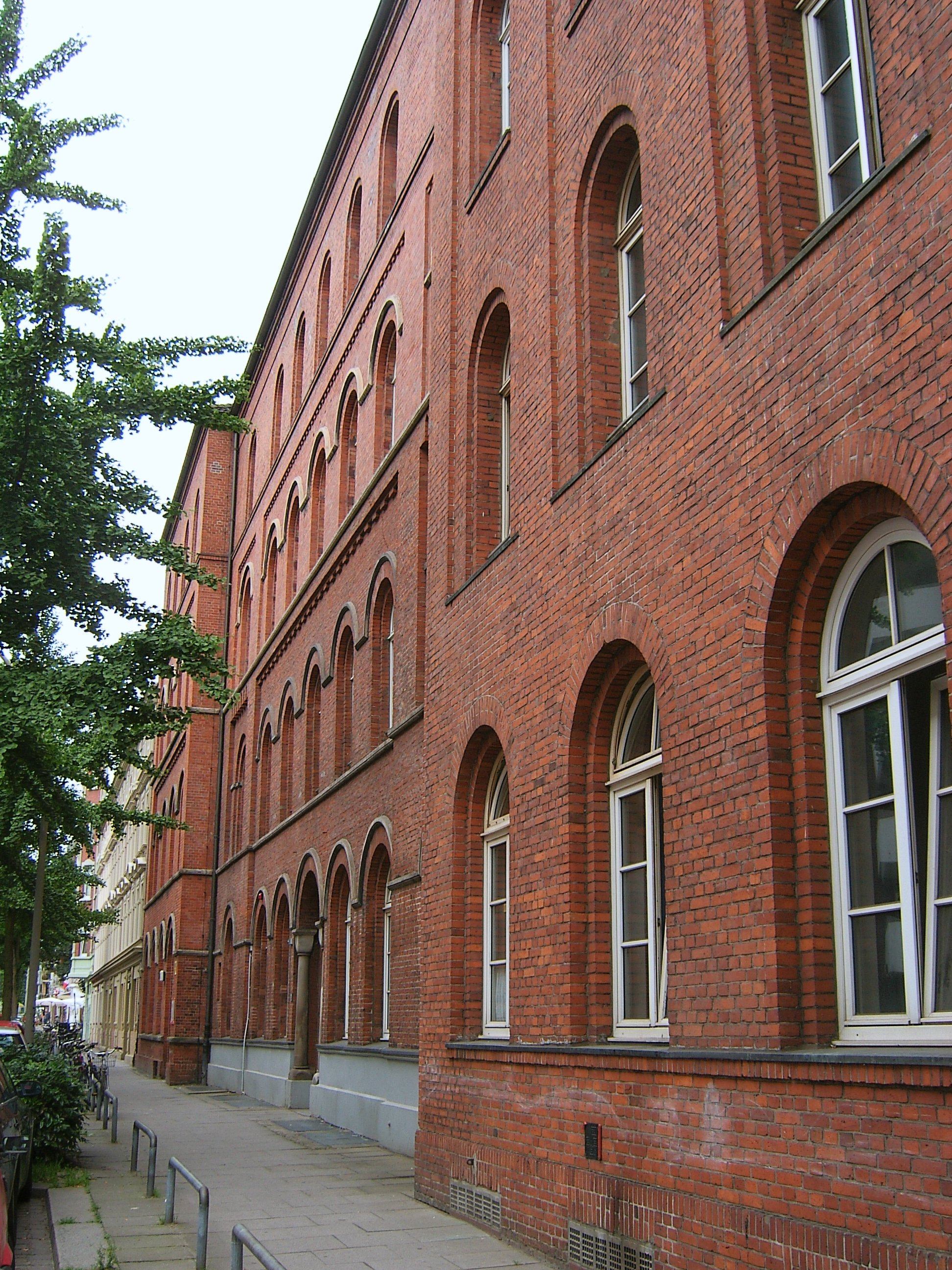 Die Polizeiwache mit -gefängnis in den Hütten 40 in der Hamburger Neustadt wurde 1857/58 nach Plänen von Franz Gustav Forsmann errichtet. In der NS-Zeit diente das Polizeigefängnis vor allem der Inhaftierung politischer Gegner. This is a photograph of an architectural monument.